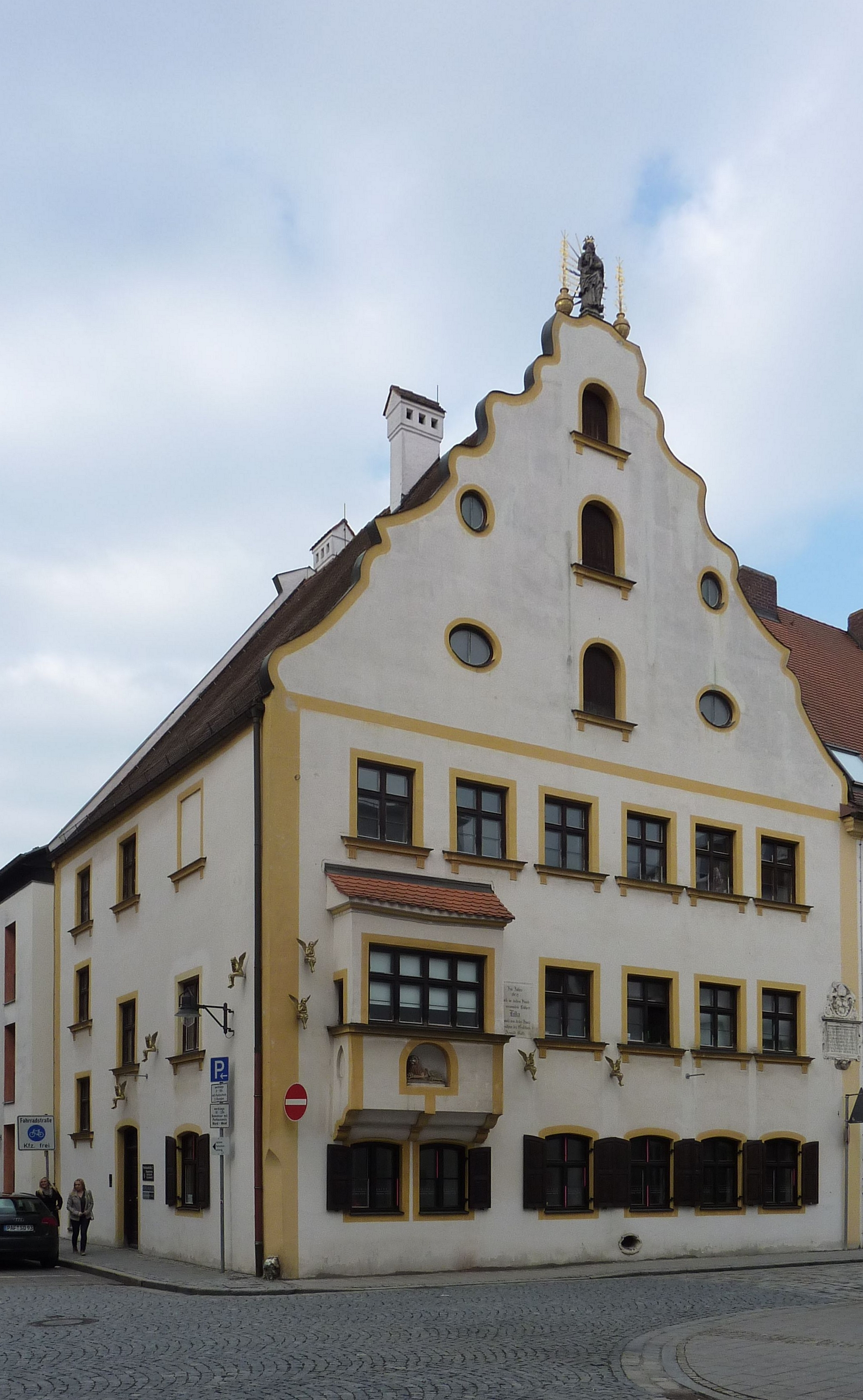 Haus, in dem Tilly starb